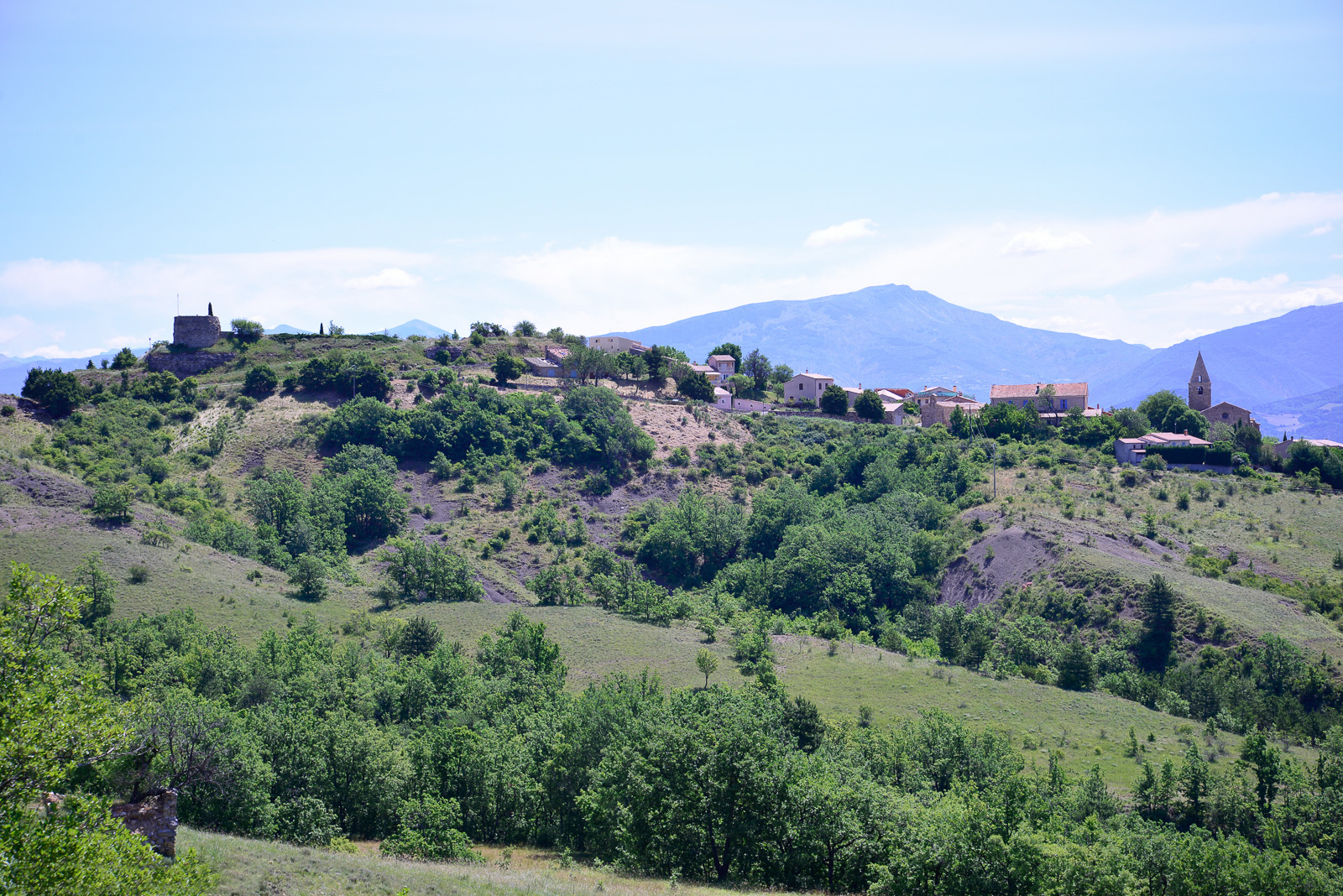 Upaix, vue du village